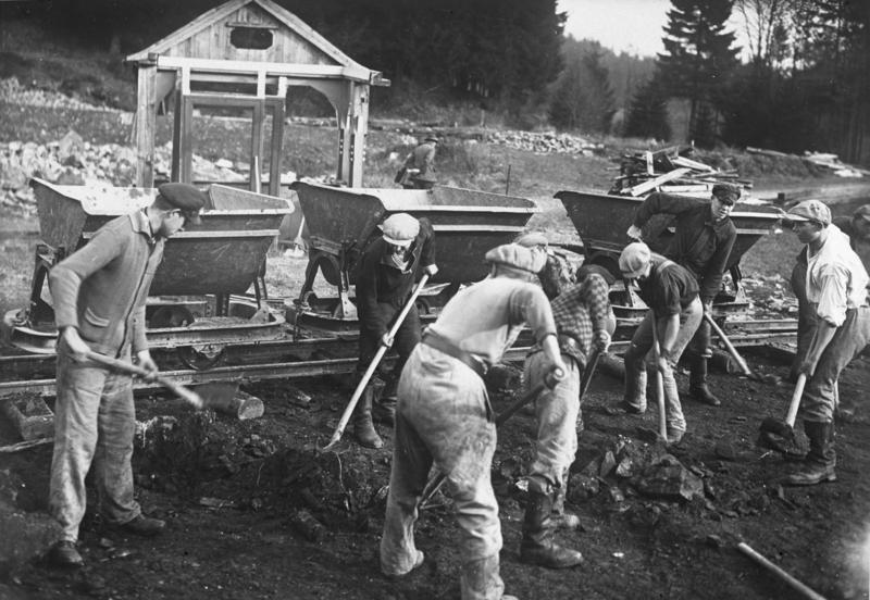 Reichsbanner siedelt! Freiwlliger Arbeitsdienst des Reichsbanners an der Talsperre Lehnmühle im Erzgebirge. Alle Arbeitsfreiwilligen sind Handwerker und erhalten ausser freier Beköstigung und Unterkunft 50 Pf. täglich. Reichsbannerleute des Freiwilligen Arbeitsdienstes bei Erdarbeiten